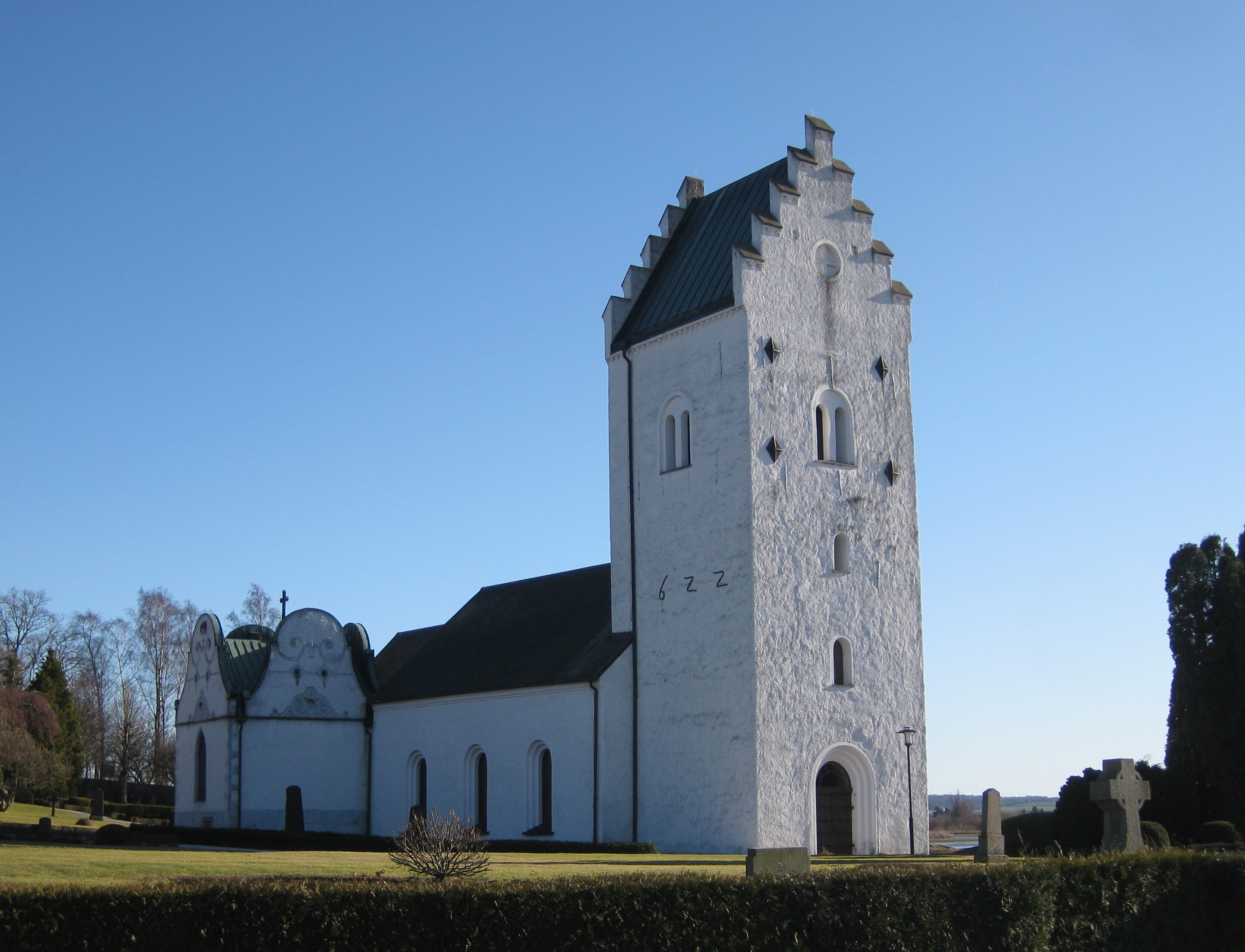 Gårdstånga kyrka i Skåne